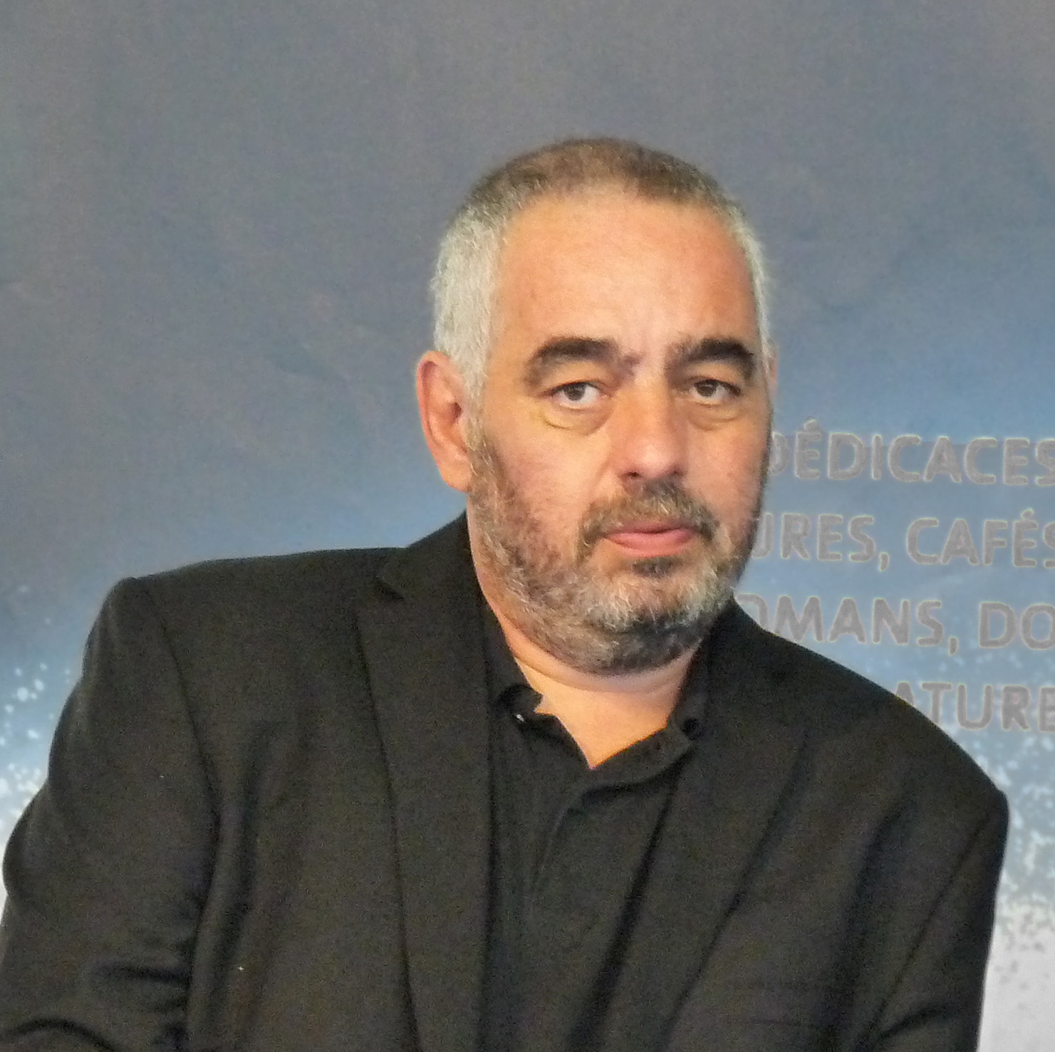 Philippe Jaenada au Salon du livre en Bretagne (Vannes, Morbihan)